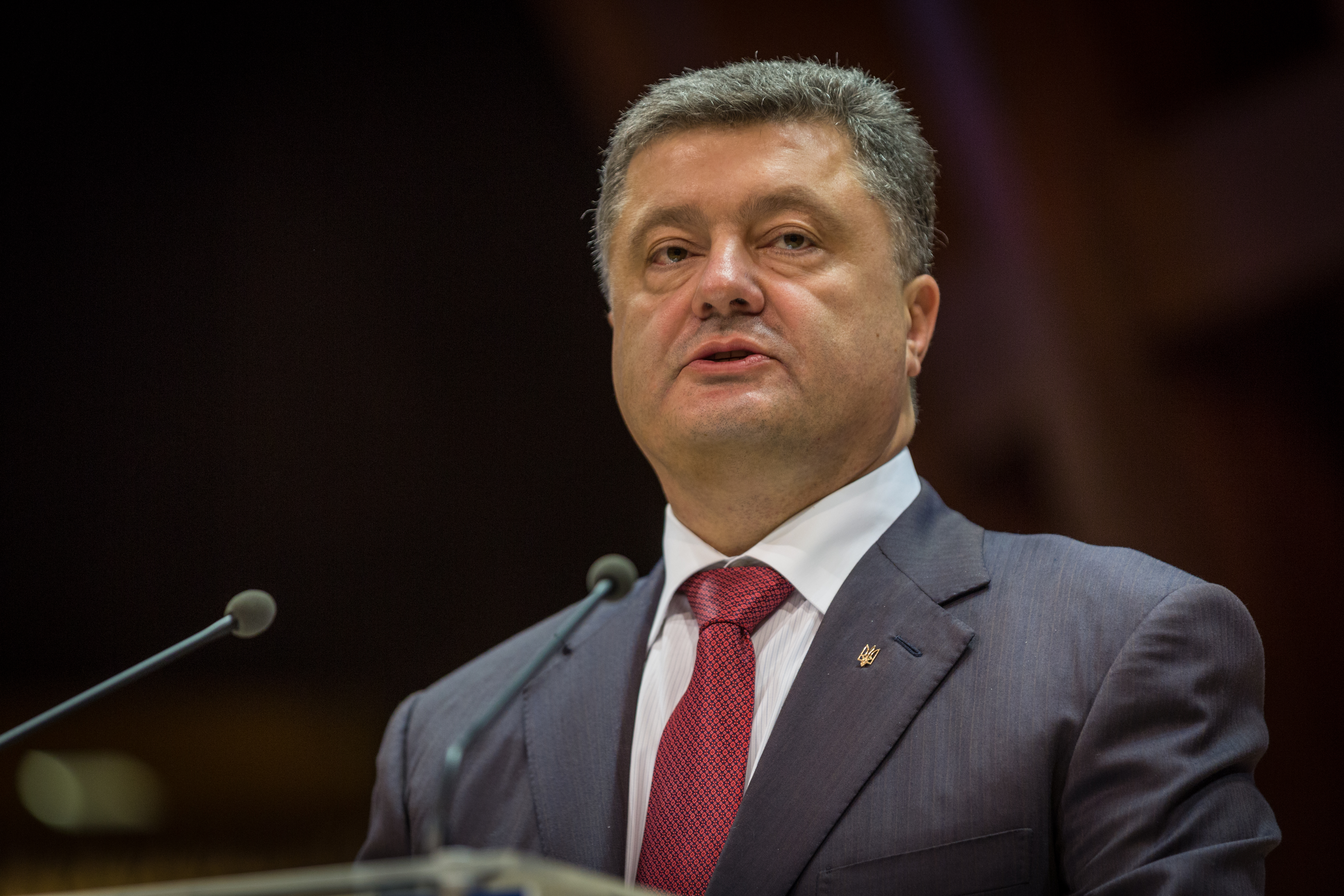 Visite officielle du Président de la République d’Ukraine Petro Porochenko au Conseil de l’Europe, Strasbourg 26 juin 2014.